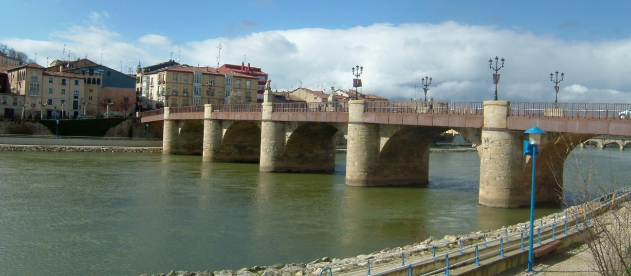 Carlos III Bridge - Puente Carlos III (Miranda de Ebro, Spain)